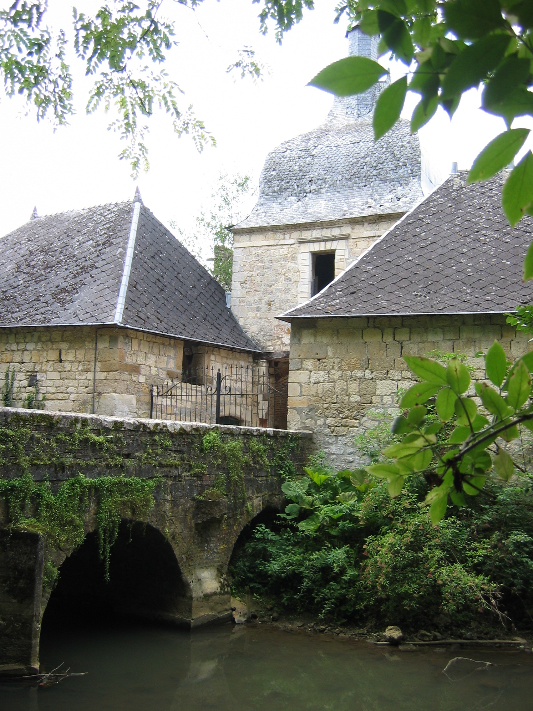 Fosse du château de Wasigny _ Ardennes - France